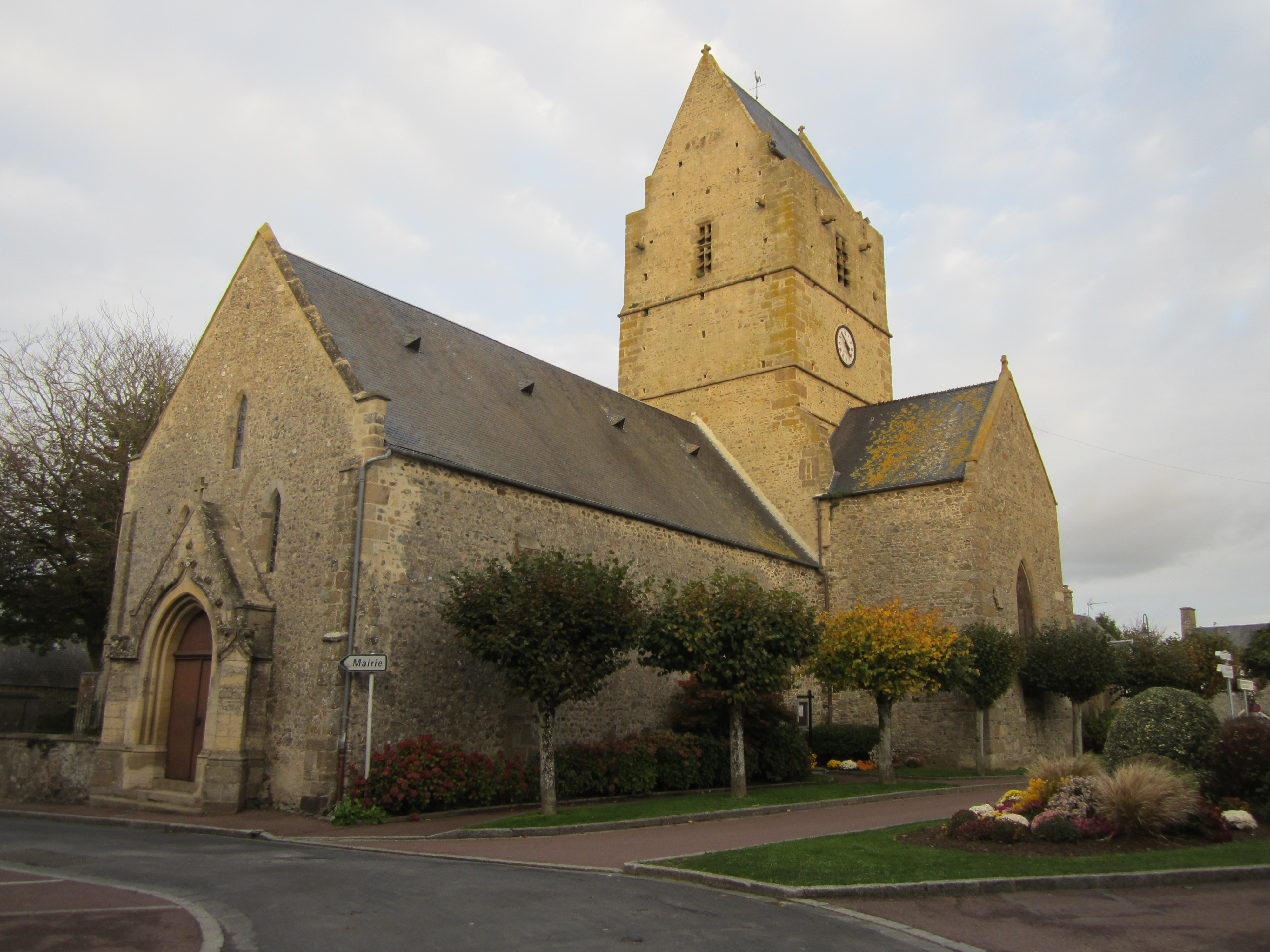 Agon-Coutainville, Manche